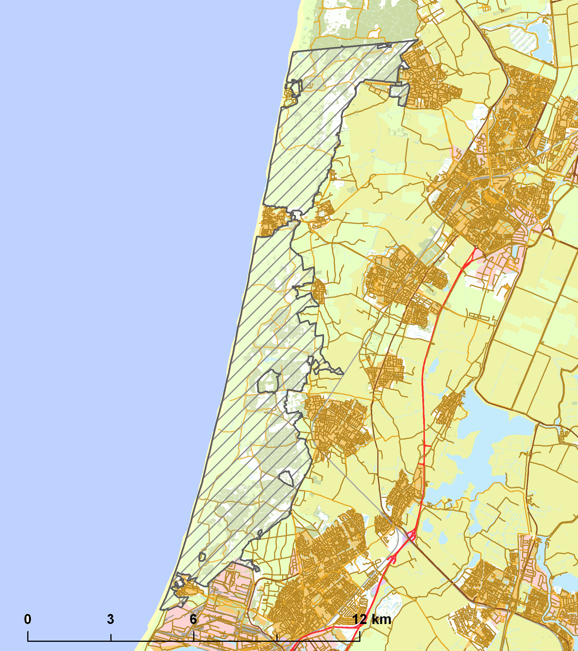 Natura2000 - Noordhollands Duinreservaat.png